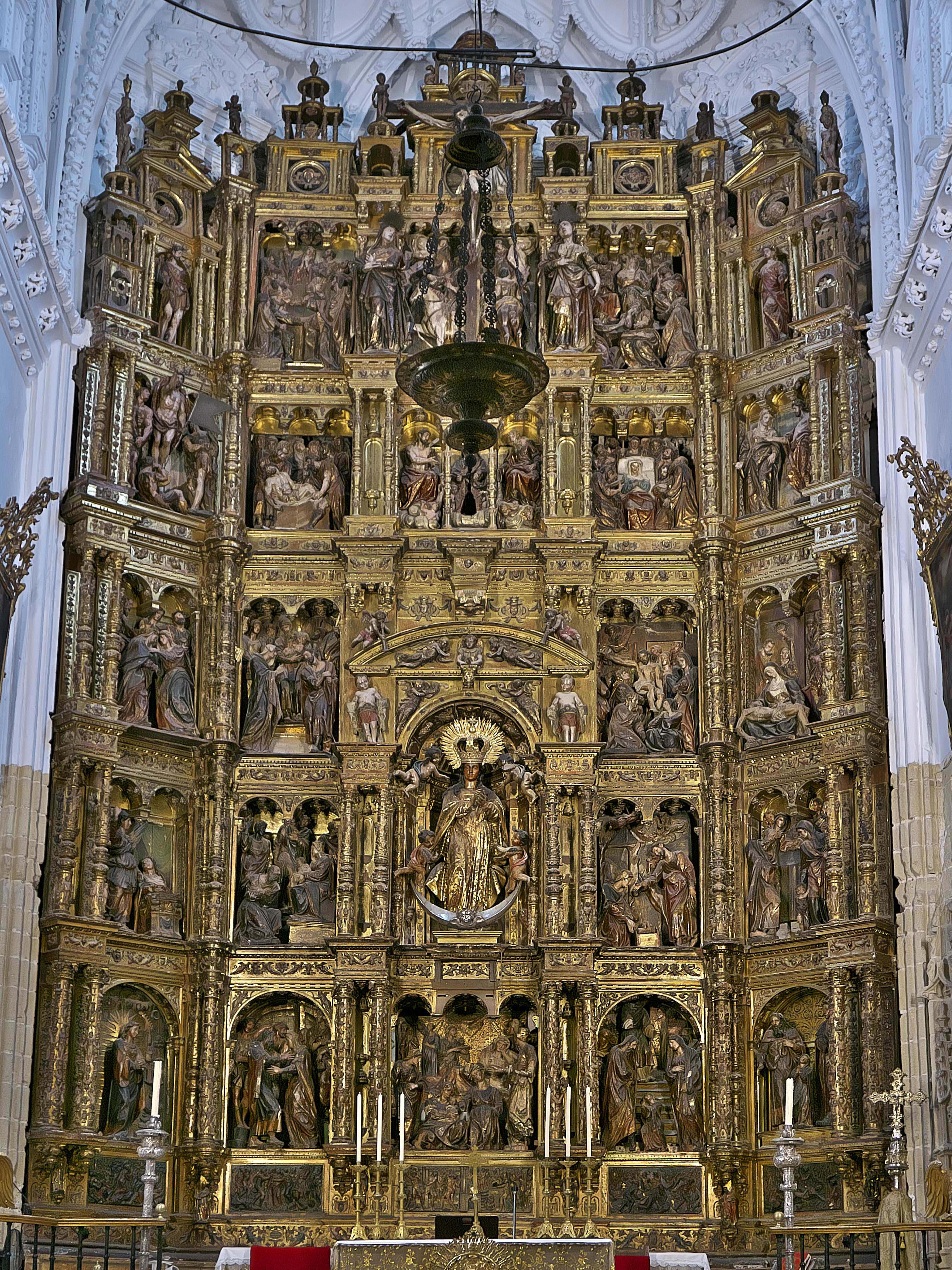 Entre los principales del manierismo español. Con primeras trazas (1559-1562) de Roque Balduque, Juan Bautista Vázquez el Viejo, Melchor de Turín, Gaspar Núñez Delgado, la policromía de Miguel Vallés (1584), todo bajo el mecenazgo de Alonso Pérez de Guzmán.